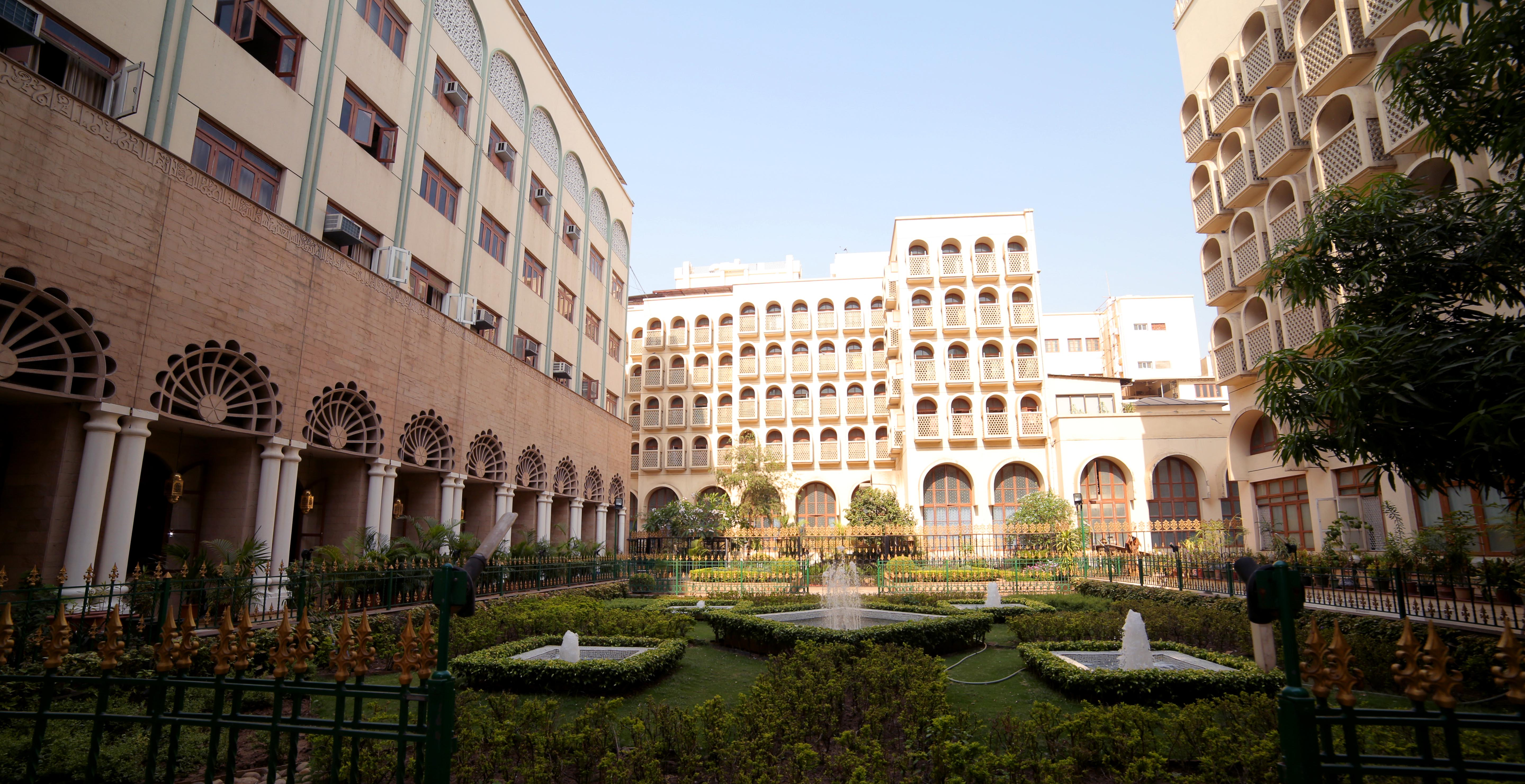 منظر من الجامعة السيفية سورت